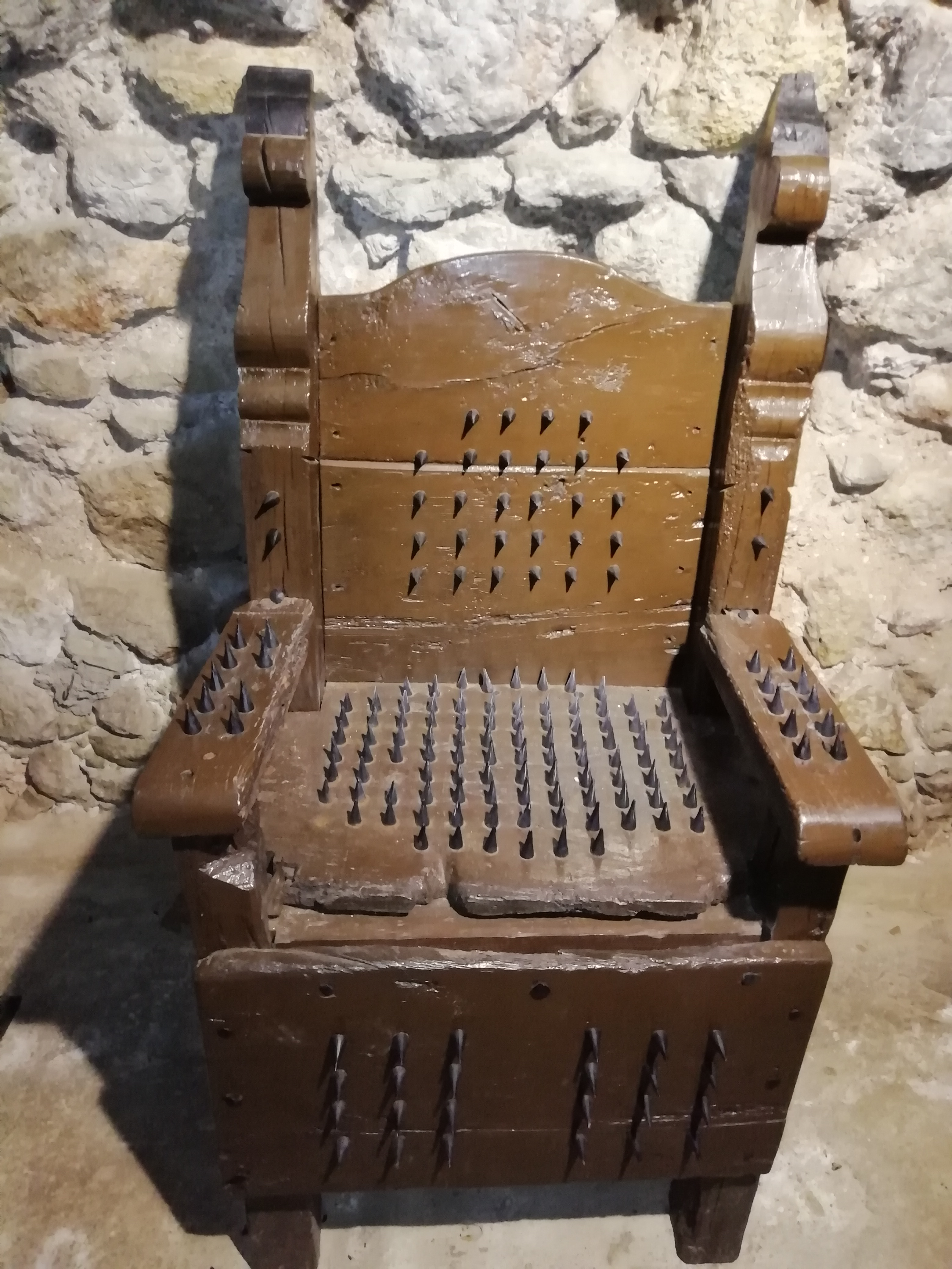 Silla de tortura en la finca Sa Granja, en Esporlas, Mallorca.